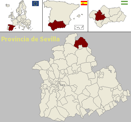 Mapa de localización del municipio sevillano de Alanís (Andalucía, España)